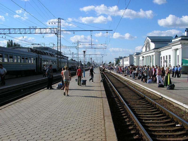 Nádraží v Melitopoli.